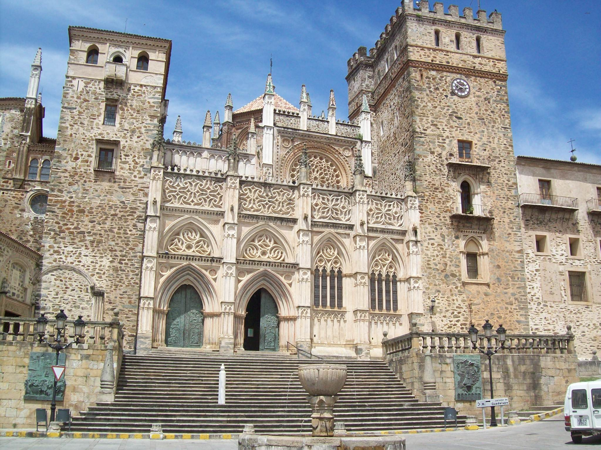 Fachada principal del monasterio de Guadalupe, provincia de Caceres, (España).